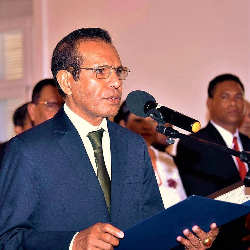 Premierminister Taur Matan Ruak